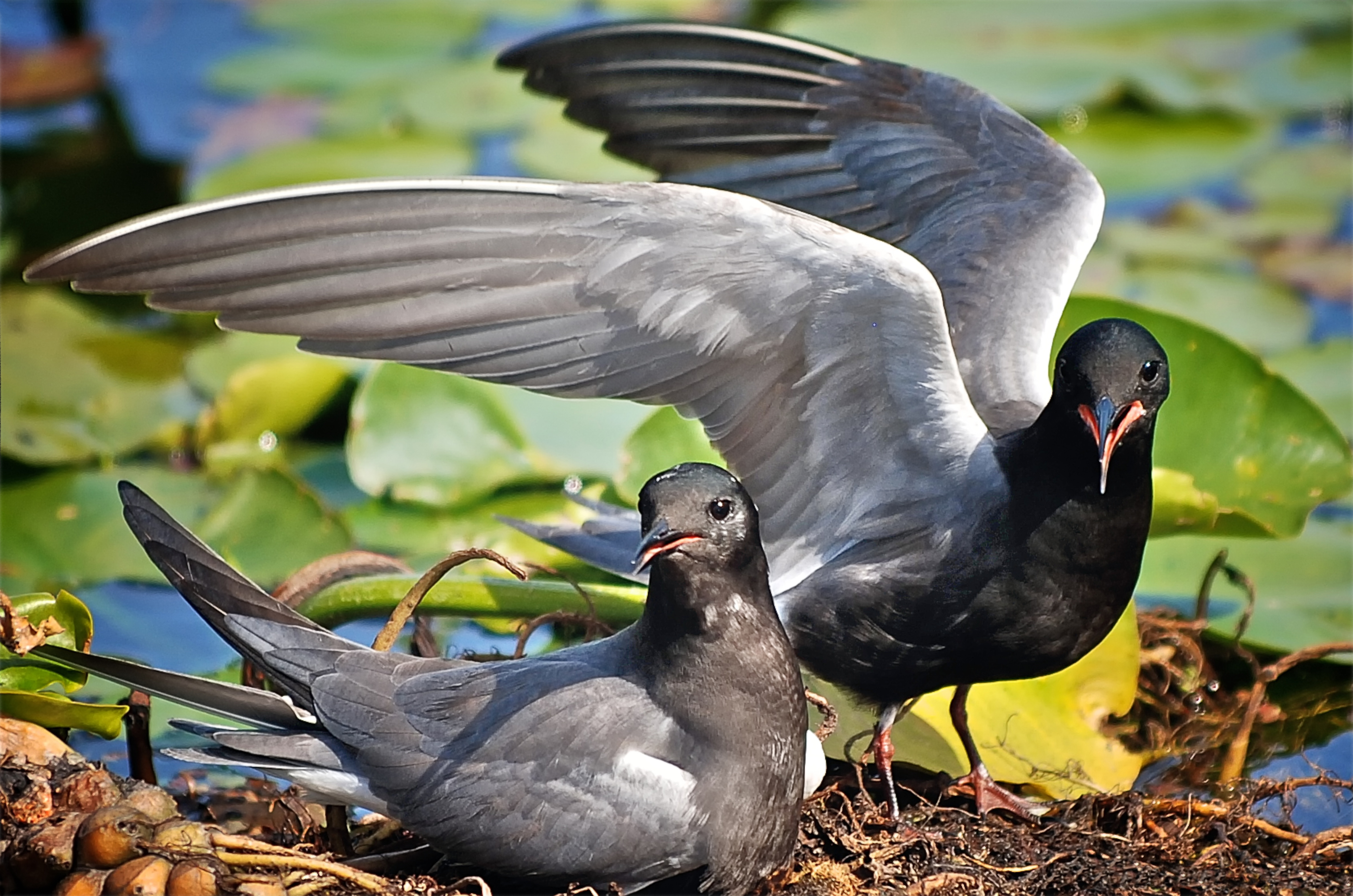 Chlidonias niger, Point Pelee, Ontario, Canada